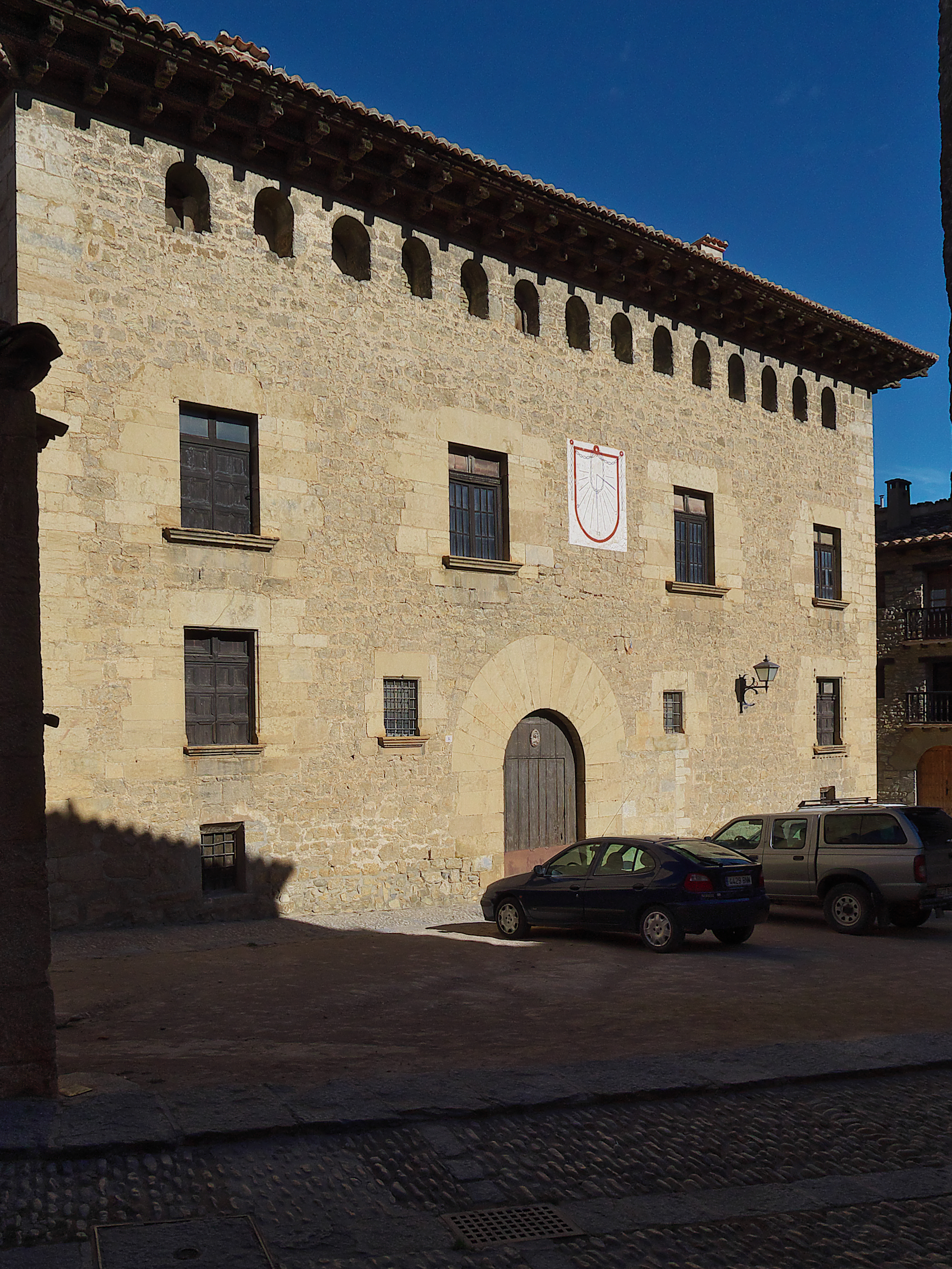 Palacio mirambelano del Ducado de Aliaga, siendo su primer propietario Juan Fernández de Híjar y Cabrera (s. XVI)